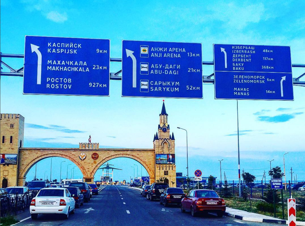 Выезд из аэропорта Махачкалы